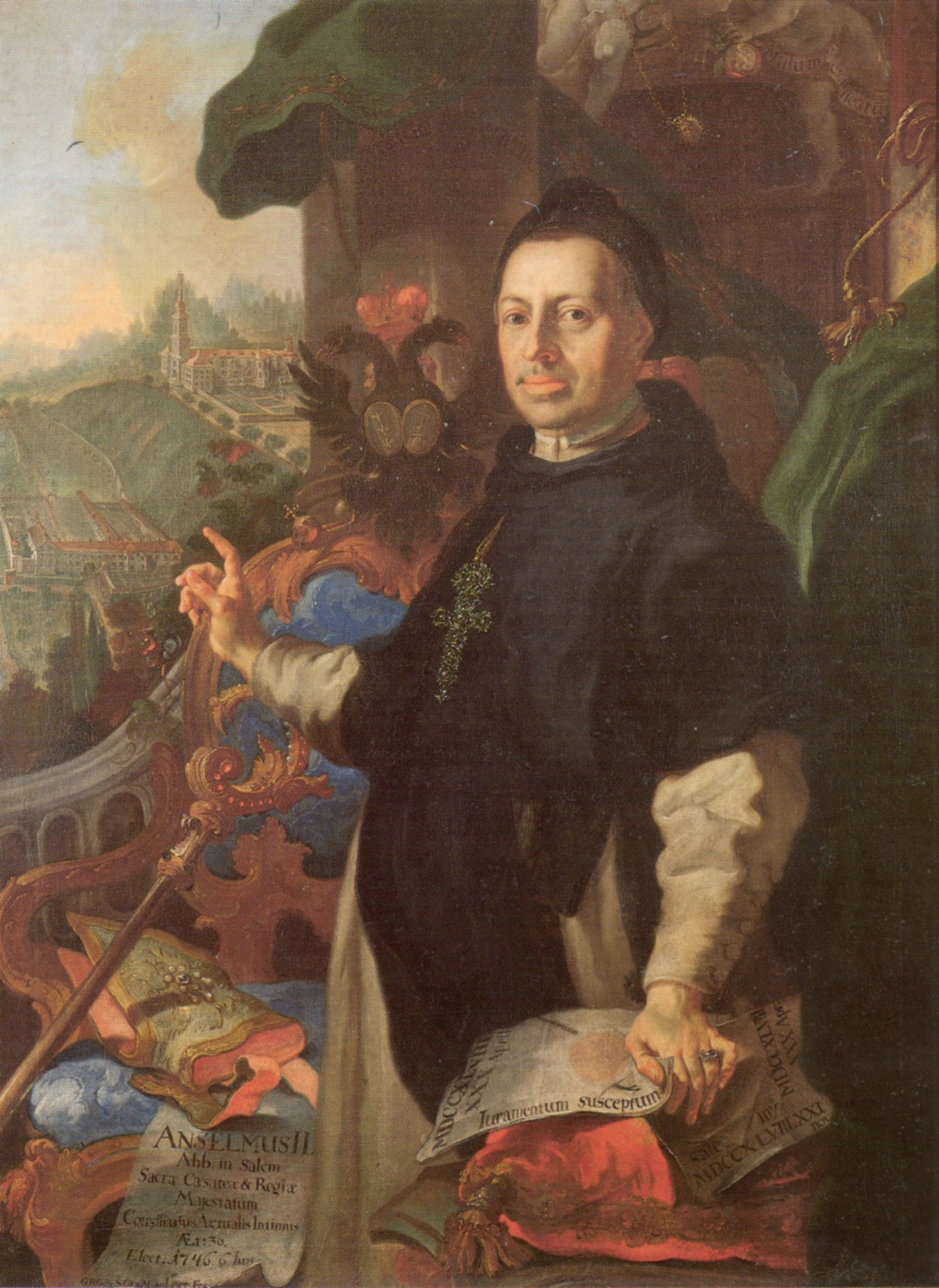 See article: Birnau.